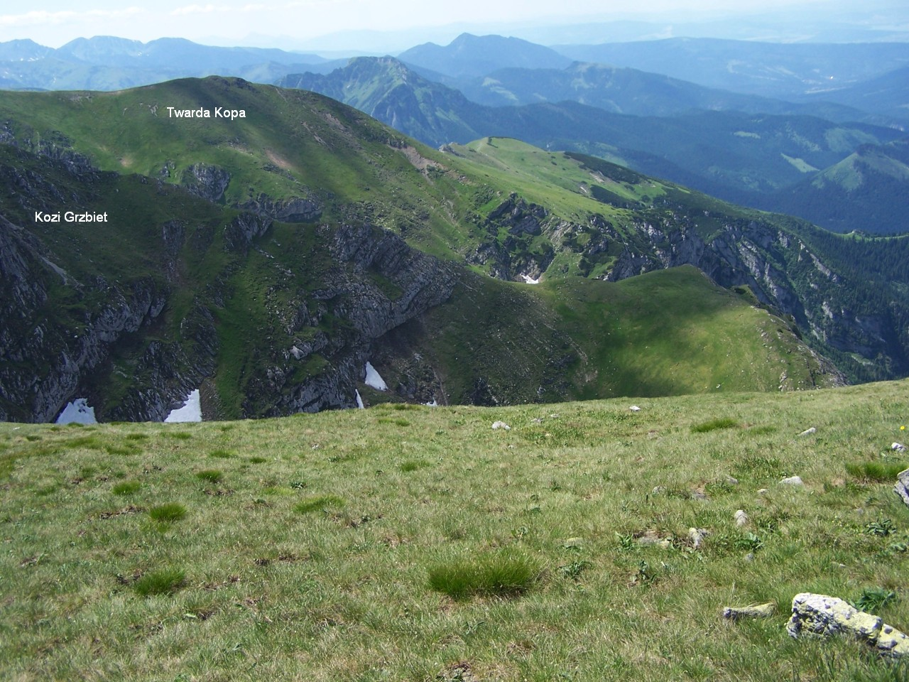 Widok na Kozi Grzbiet od strony wschodniej (z Czerwonego Grzbietu)